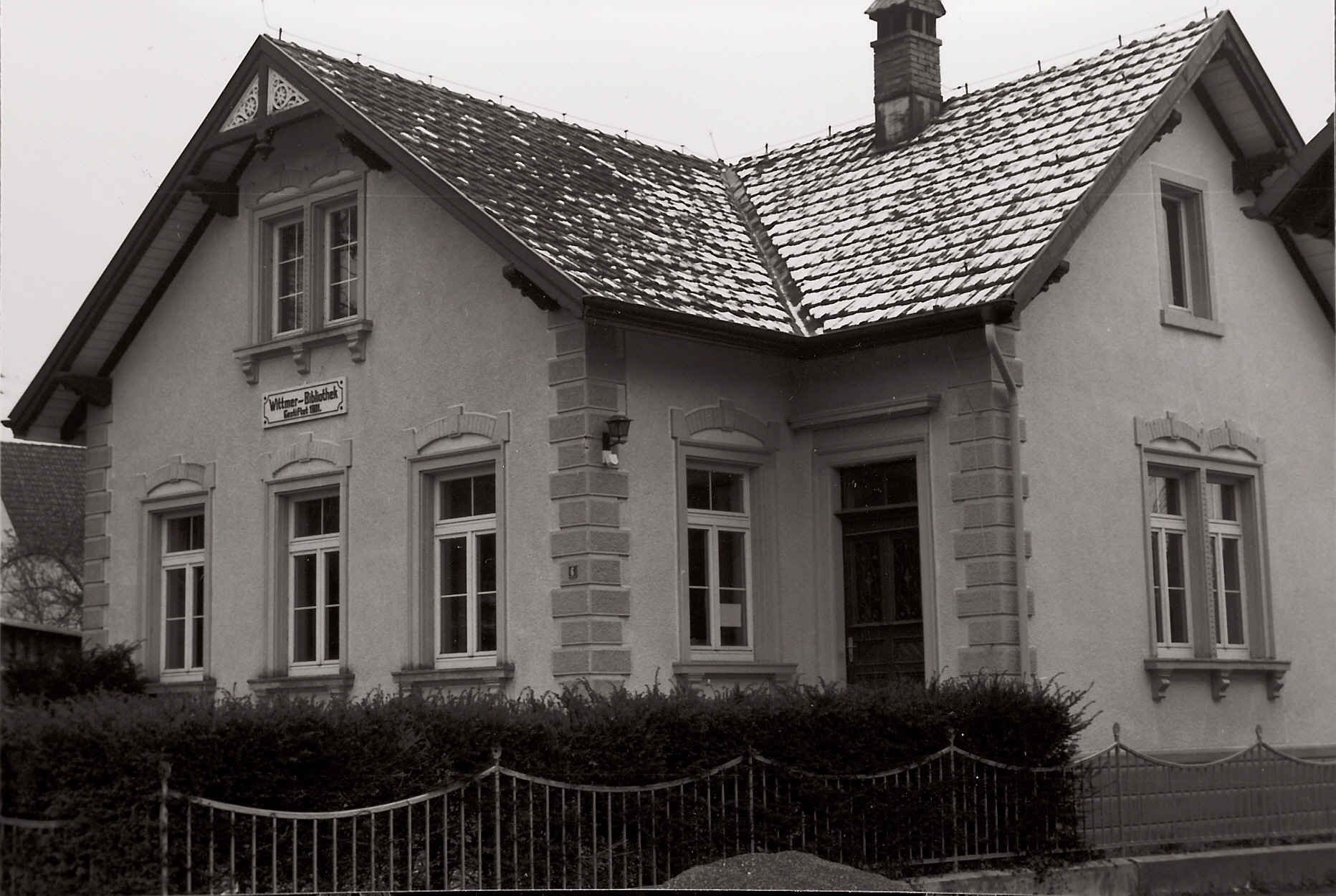 Die vom USA-Auswanderer Georg Wittmer für seinen Heimatort Dettighofen 1901 gegründete und noch heute bestehende Bibliothek.